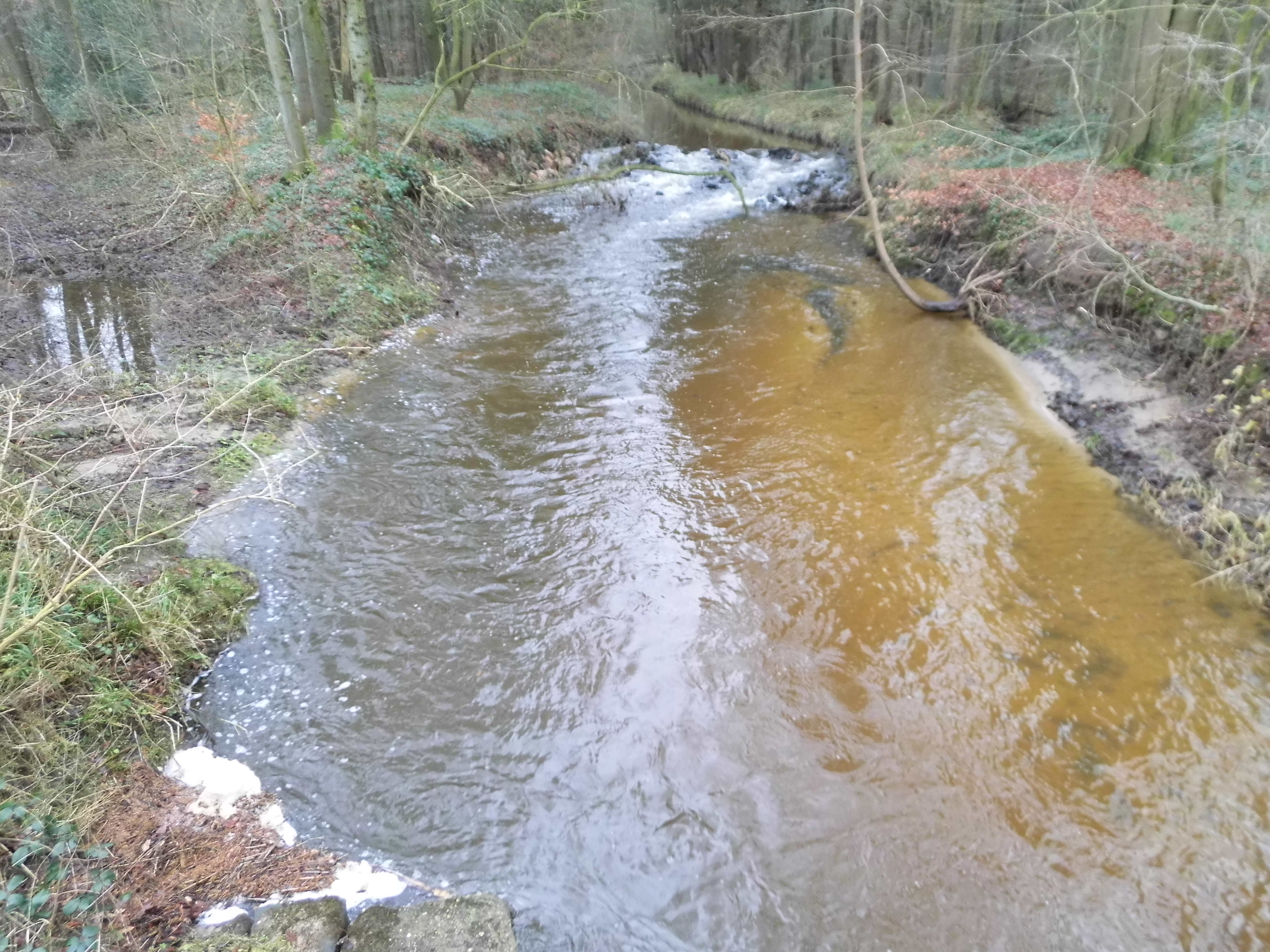 Entstehung eines Gumpen nach Öffnung eines Querbauwerkes.